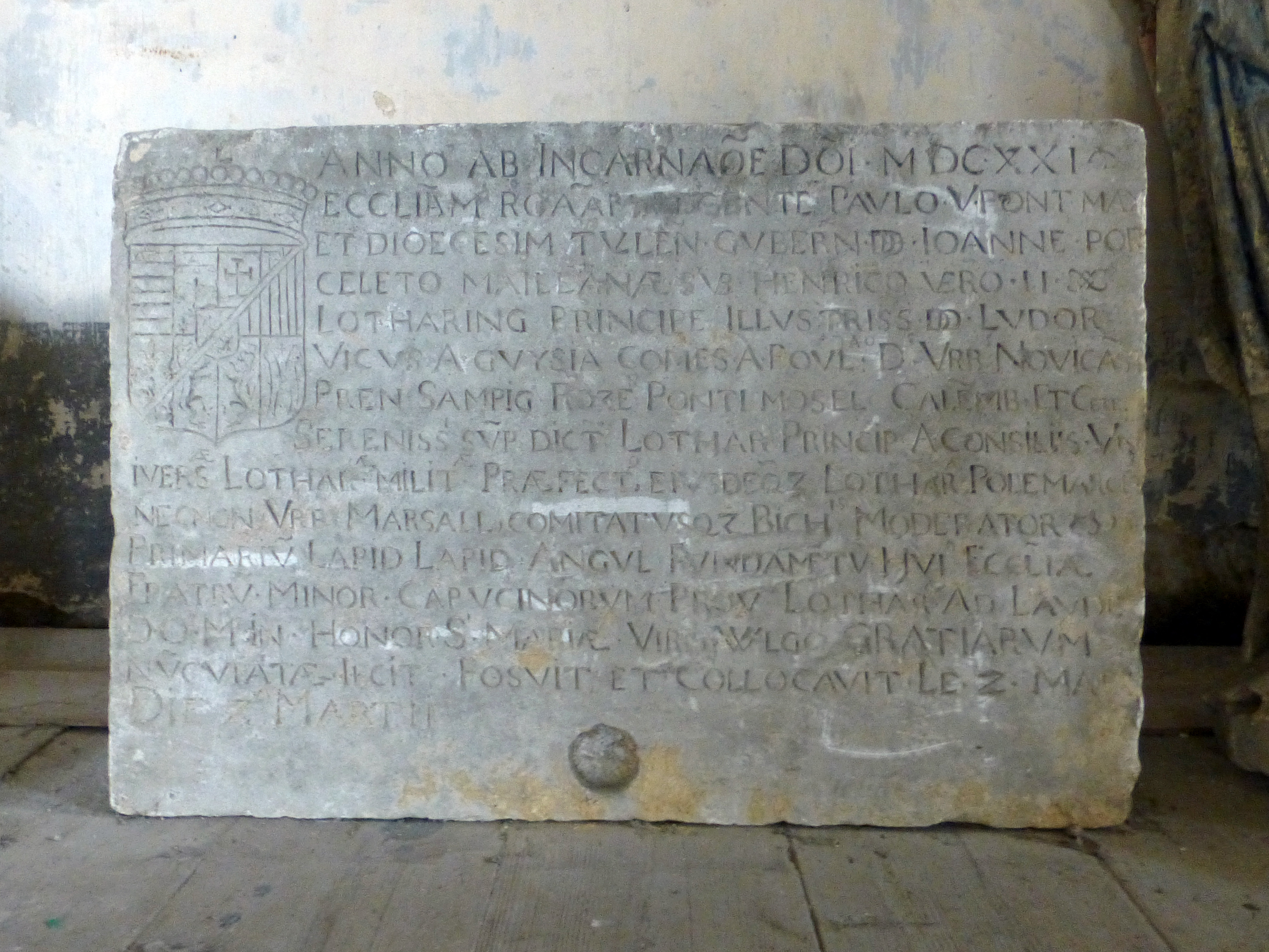 Crypte de l'église Saint-Nicolas de Neufchâteau (Vosges). Pierre de fondation du couvent des capucins de Neufchâteau, datée de 1621 et aux armes de Louis de Guise, baron d'Ancerville.